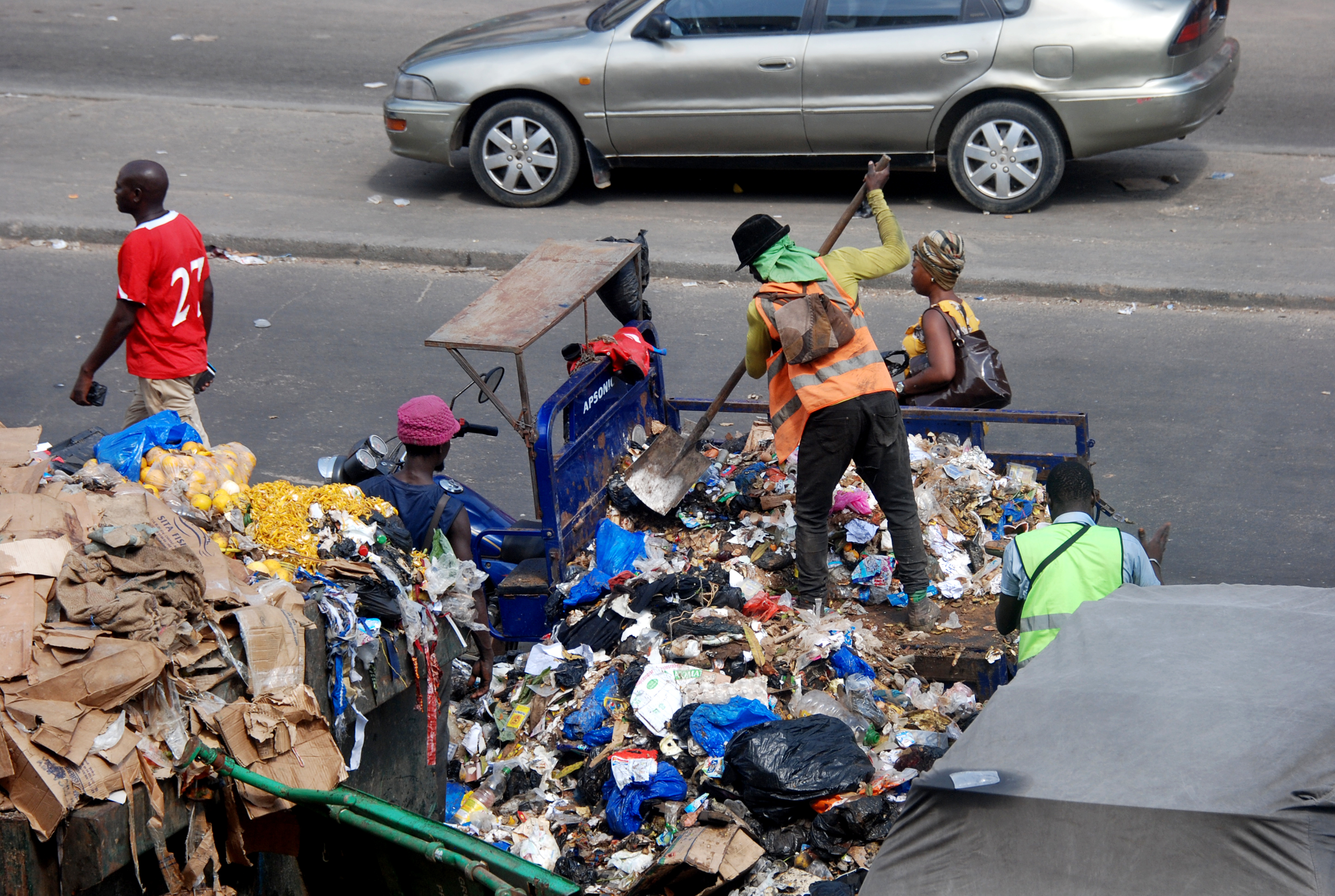 Agent de salubrité en plein travail dans la commune d'Adjamé (Abidjan) This is an image of "African people at work" from Ivory Coast